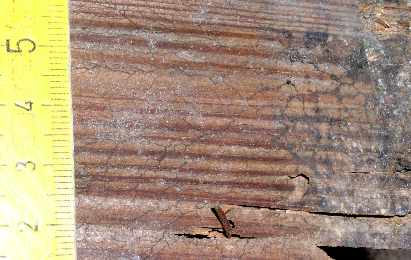 Wurzelartig verzweigtes Strangmyzel des Braunen Keller- oder Warzenschwamms (Coniophora puteana) auf einem Holzbrett.